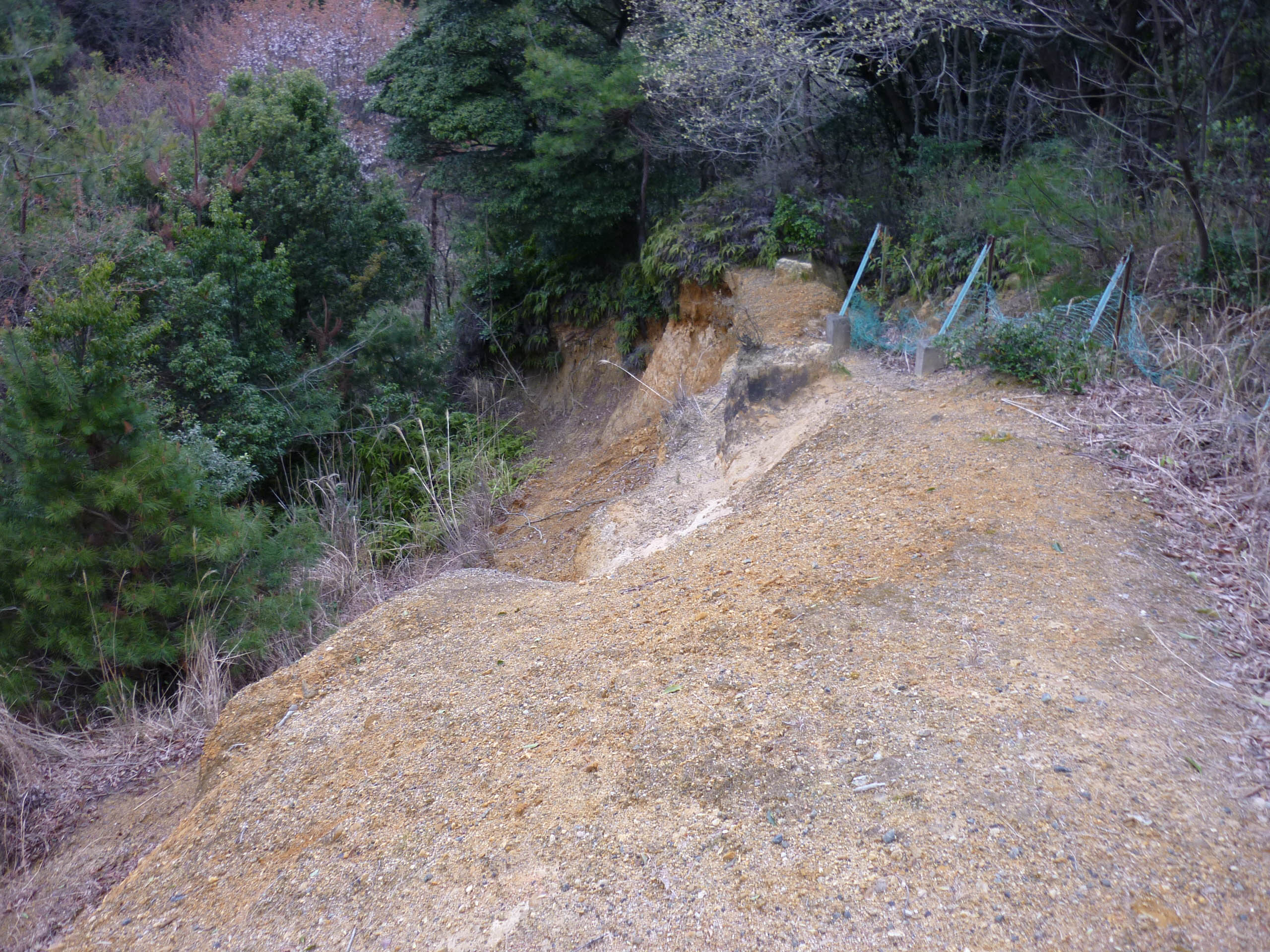 千石堀